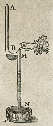 블레즈 파스칼이 에서 그린 '진공 안의 진공' 삽화.